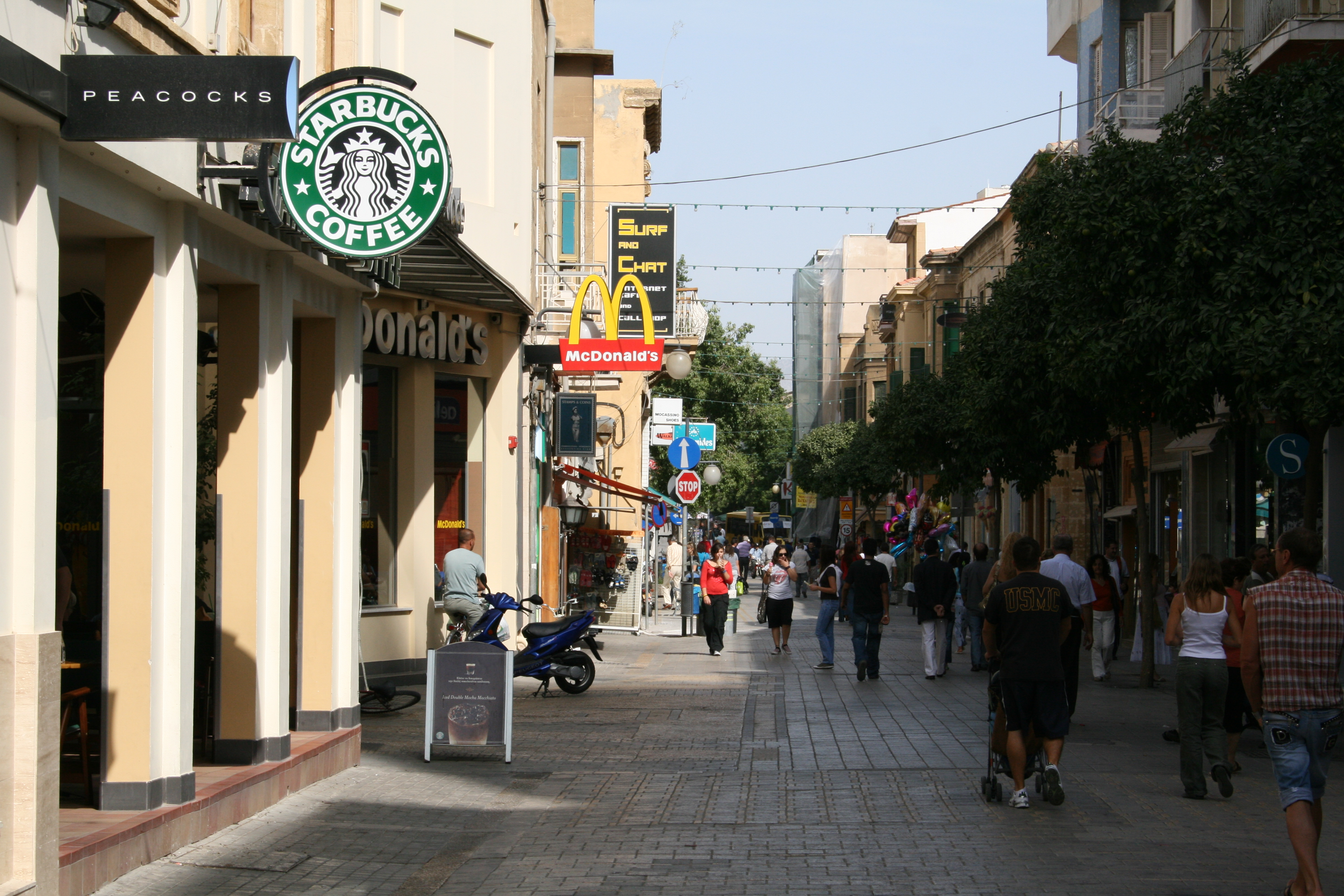 Ledra Street, Nicosia